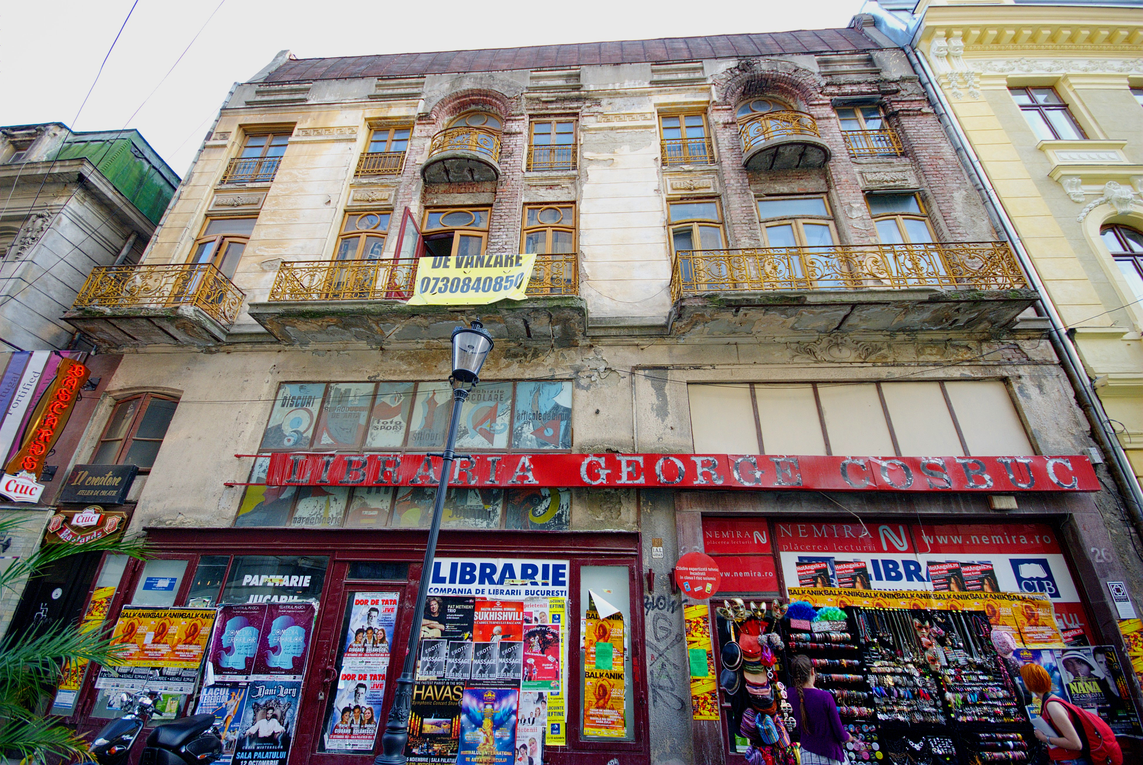 Casă cu prăvălie, Lipscani 26